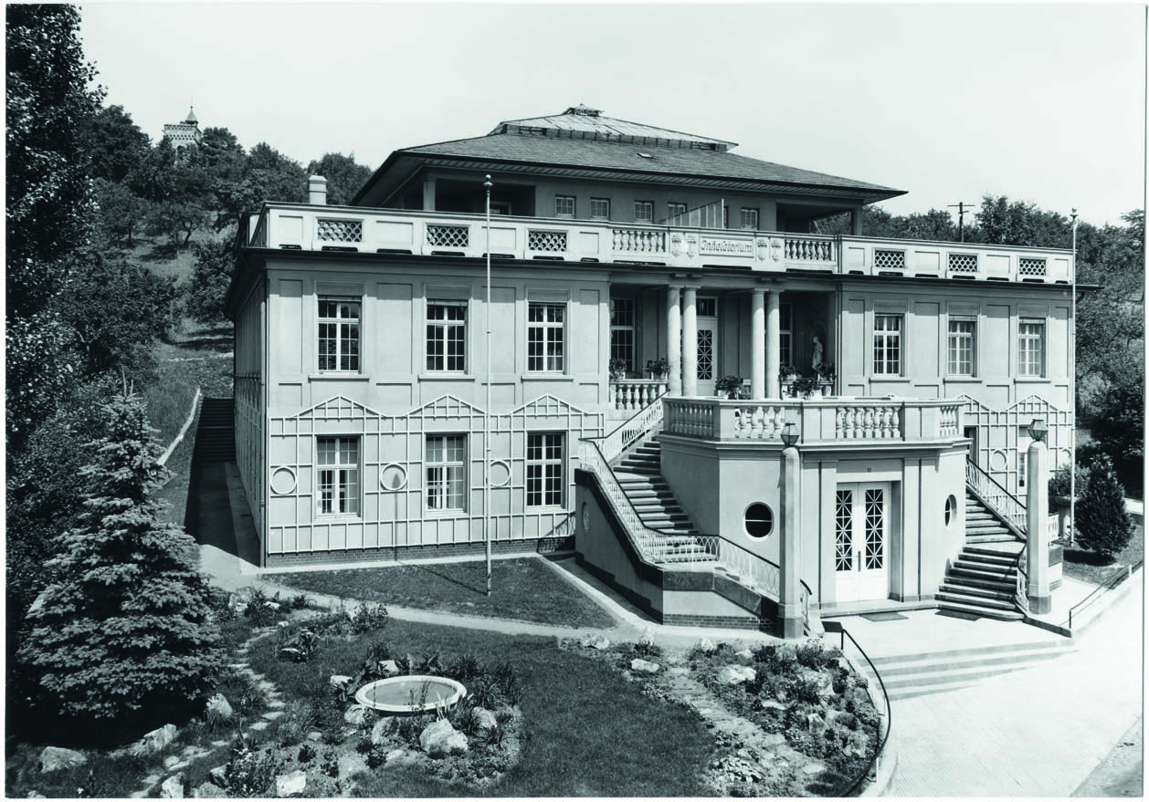 Das Burgberginhalatorium nach dem Erweiterungsbau 1928